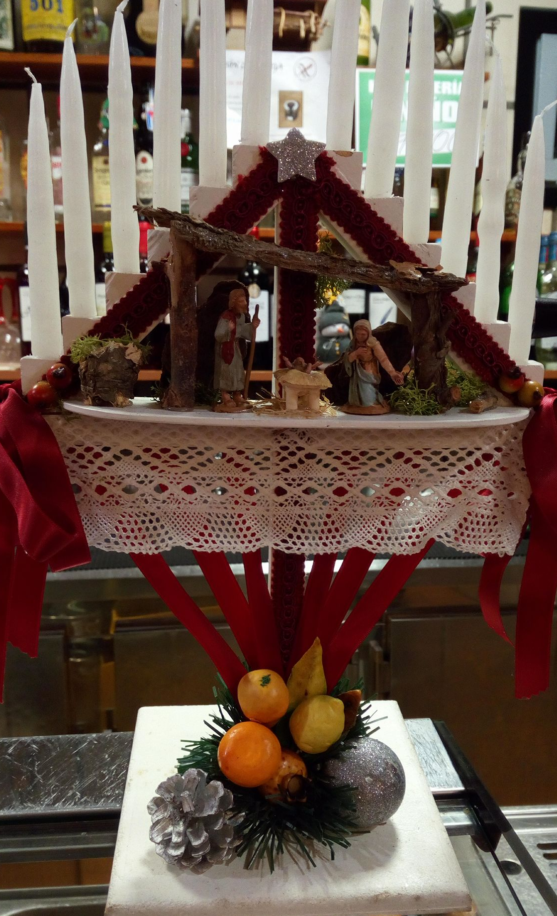 Ramu Nadal, o de Navidá, na parroquia asturiana de Carreño